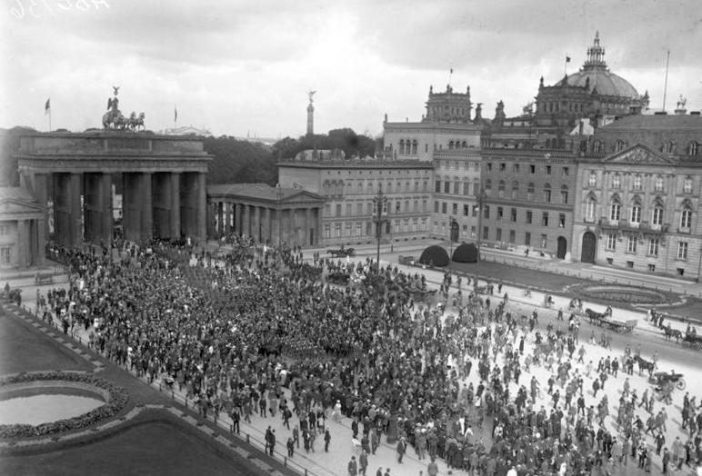 Die Verfassungsfeier in Berlin am 11. August 1923. Die Regierungstruppen ziehen mit klingendem Spiel durch das Brandenburger Tor.